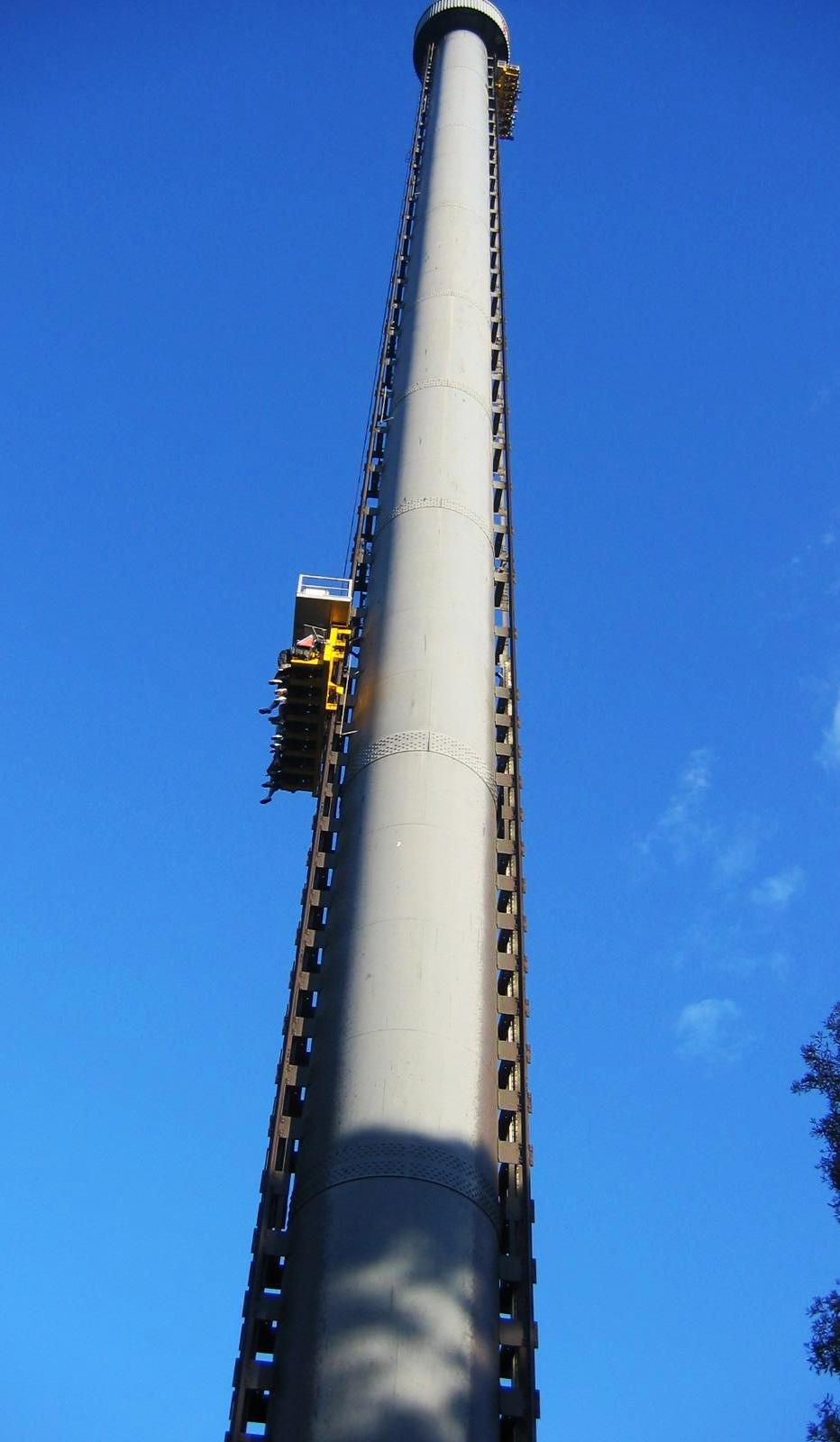 Vista de la torre de acída más alta del mundo